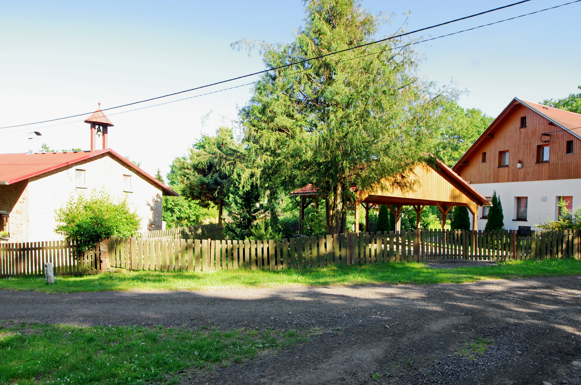 Tisová, část obce Otročín, Tepelská vrchovina, okres Karlovy Vary